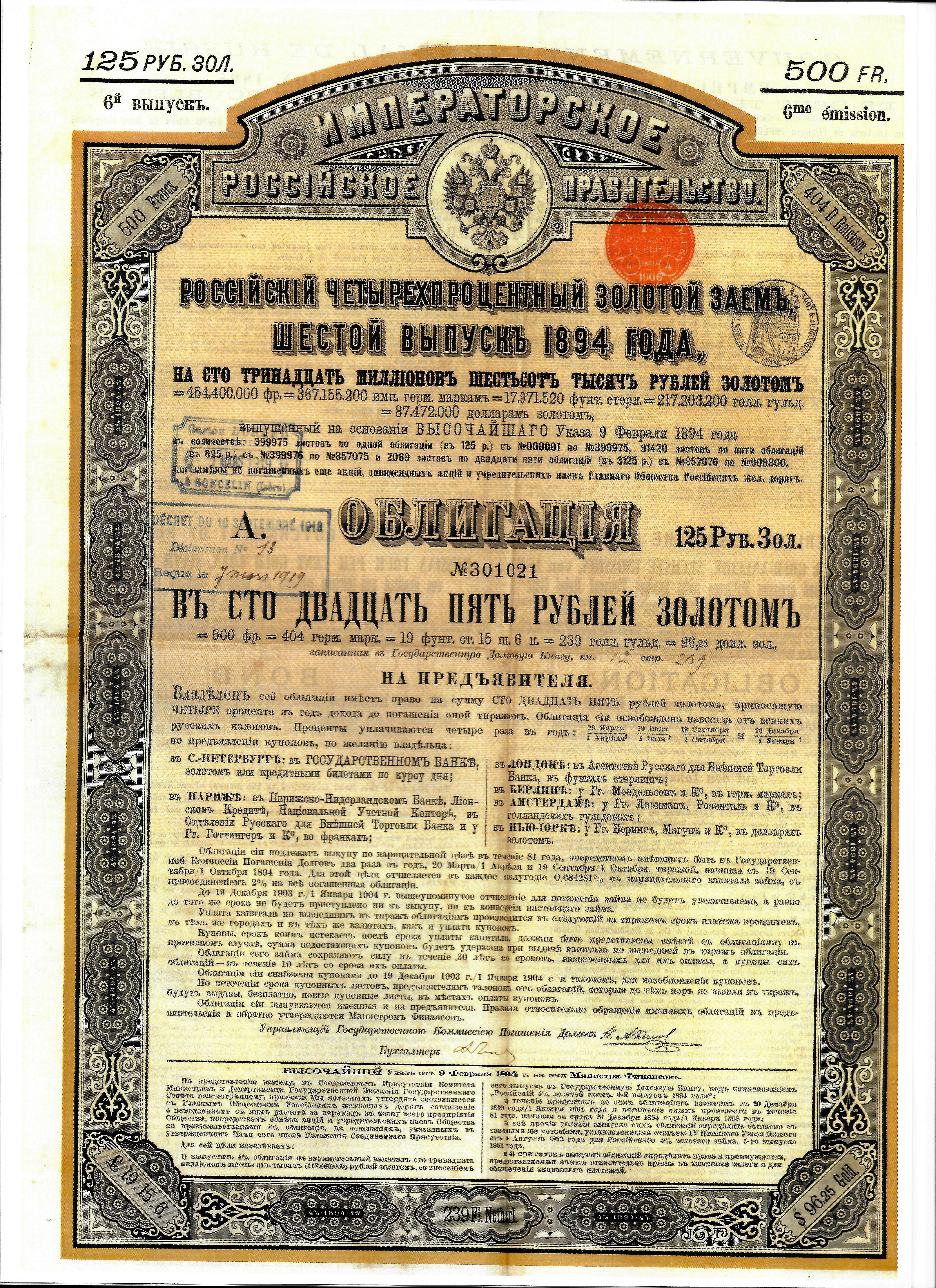 Scan d'un document original, datant de 1894 : titre au porteur portant le n° 301021. Obligation d'État de 125 Roubles-or, soit 500 francs-or, montant le plus couramment émis (il y en a eu 399 975, numérotées de 000001 à 39975). 6e émission d'un emprunt à 4% de 113 600 000 roubles, soit 454 400 000 francs, pour financer les chemins de fer russes.